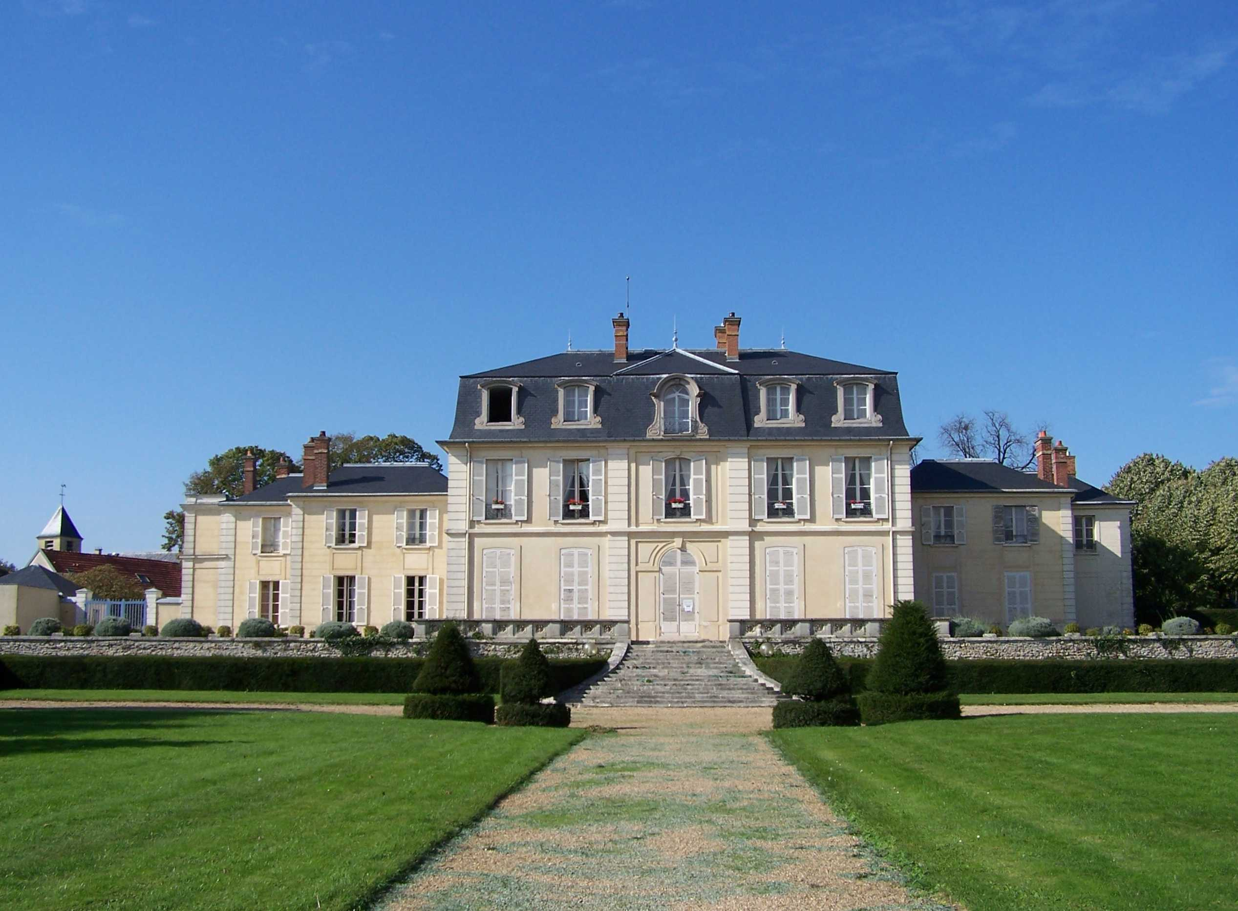 Château Aubert au Chesnay (Yvelines, France). En arrière plan, à gauche, le clocher de l'église Saint-Germain.